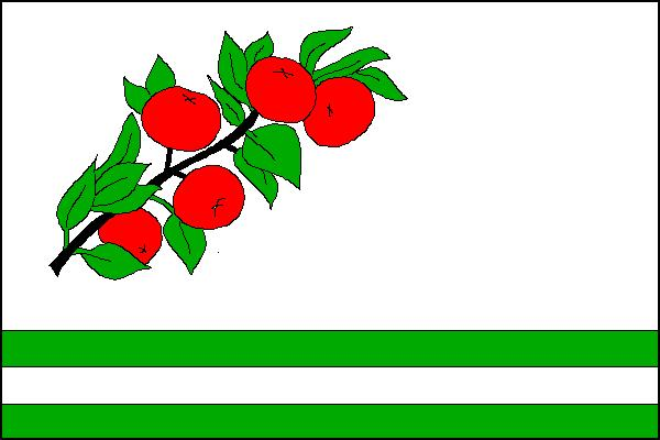 Vlajka obce Žďárná